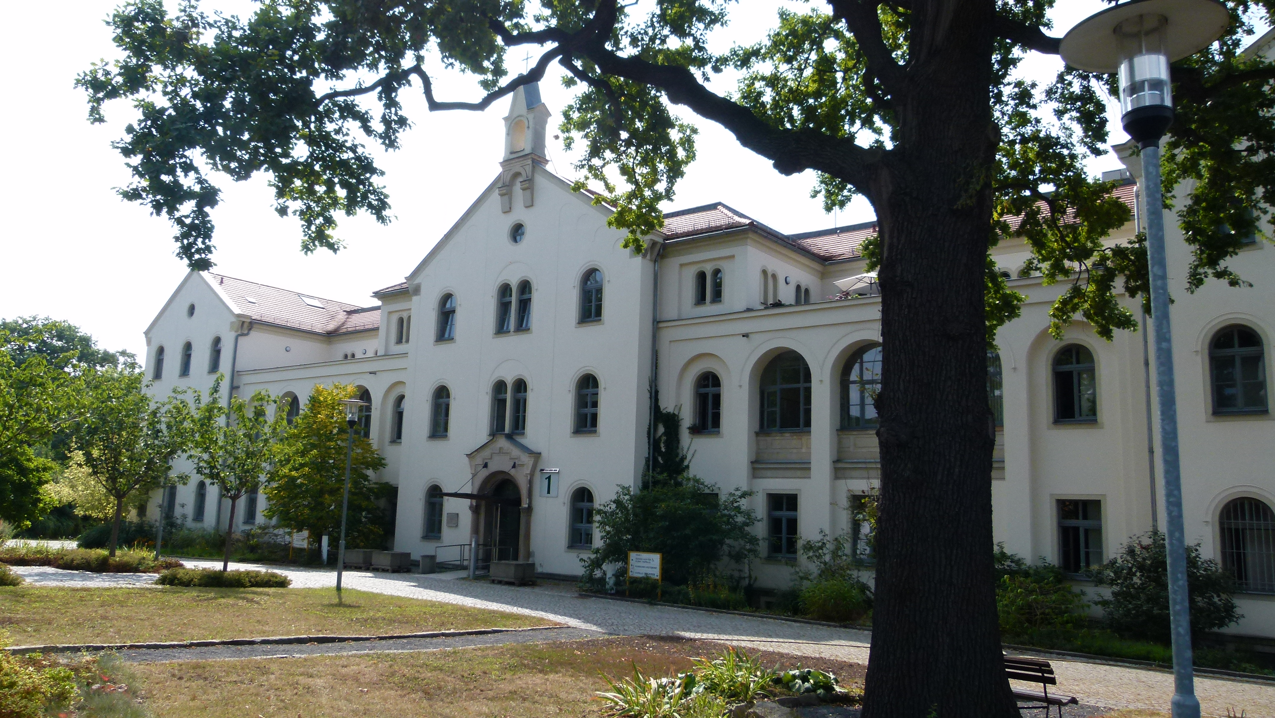 Denkmalgeschütztes Haus, Heinrich-Zille-Straße 13, Radebeul, Sachsen